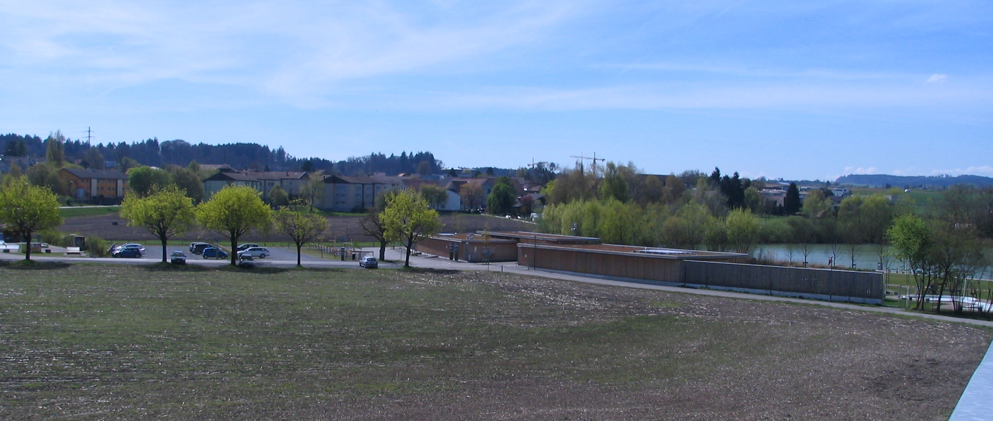 Moossee, Strandbad und ein Teil des Dorfs